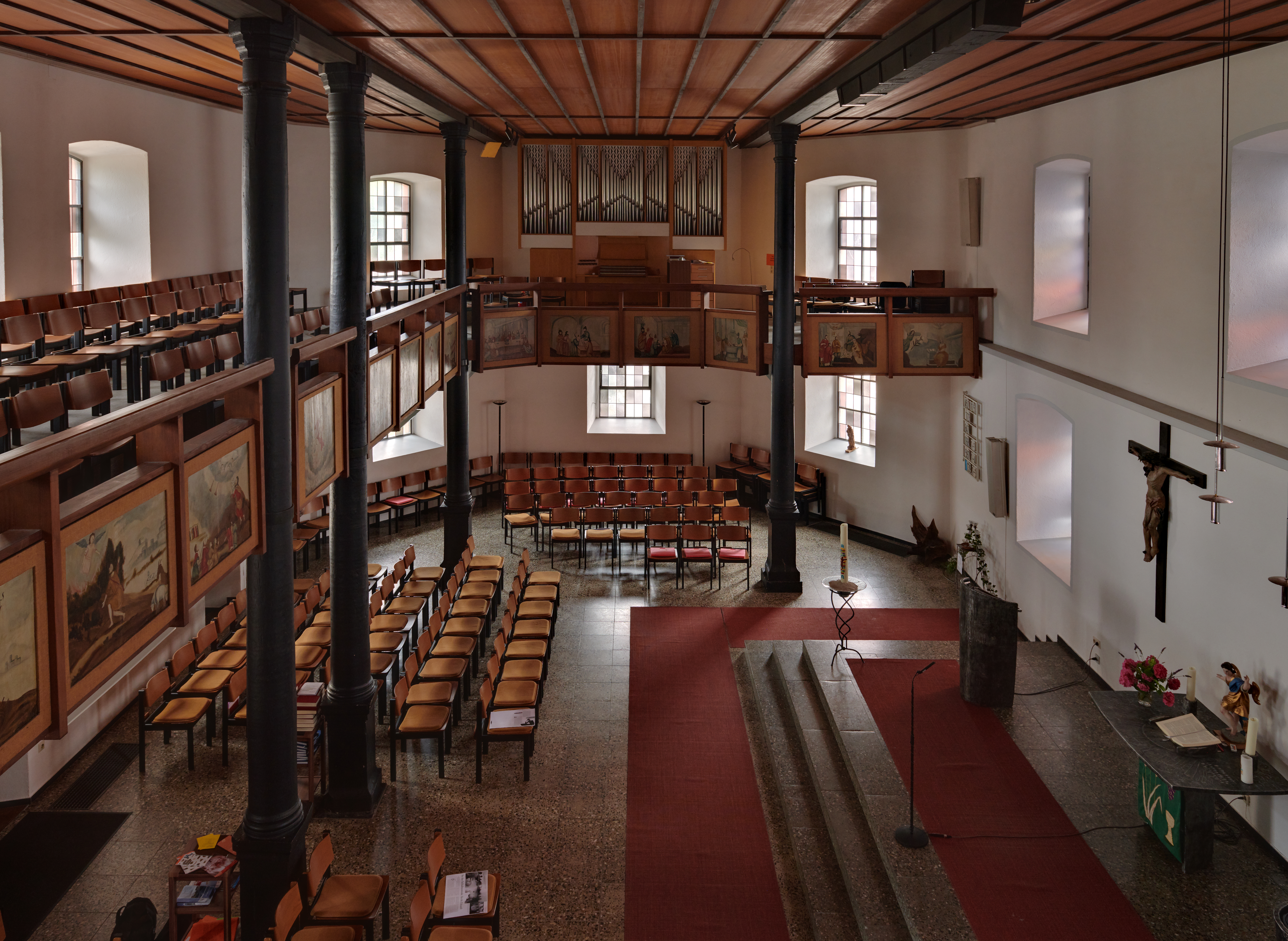 Hauinger Kirche: Langhaus von der Empore